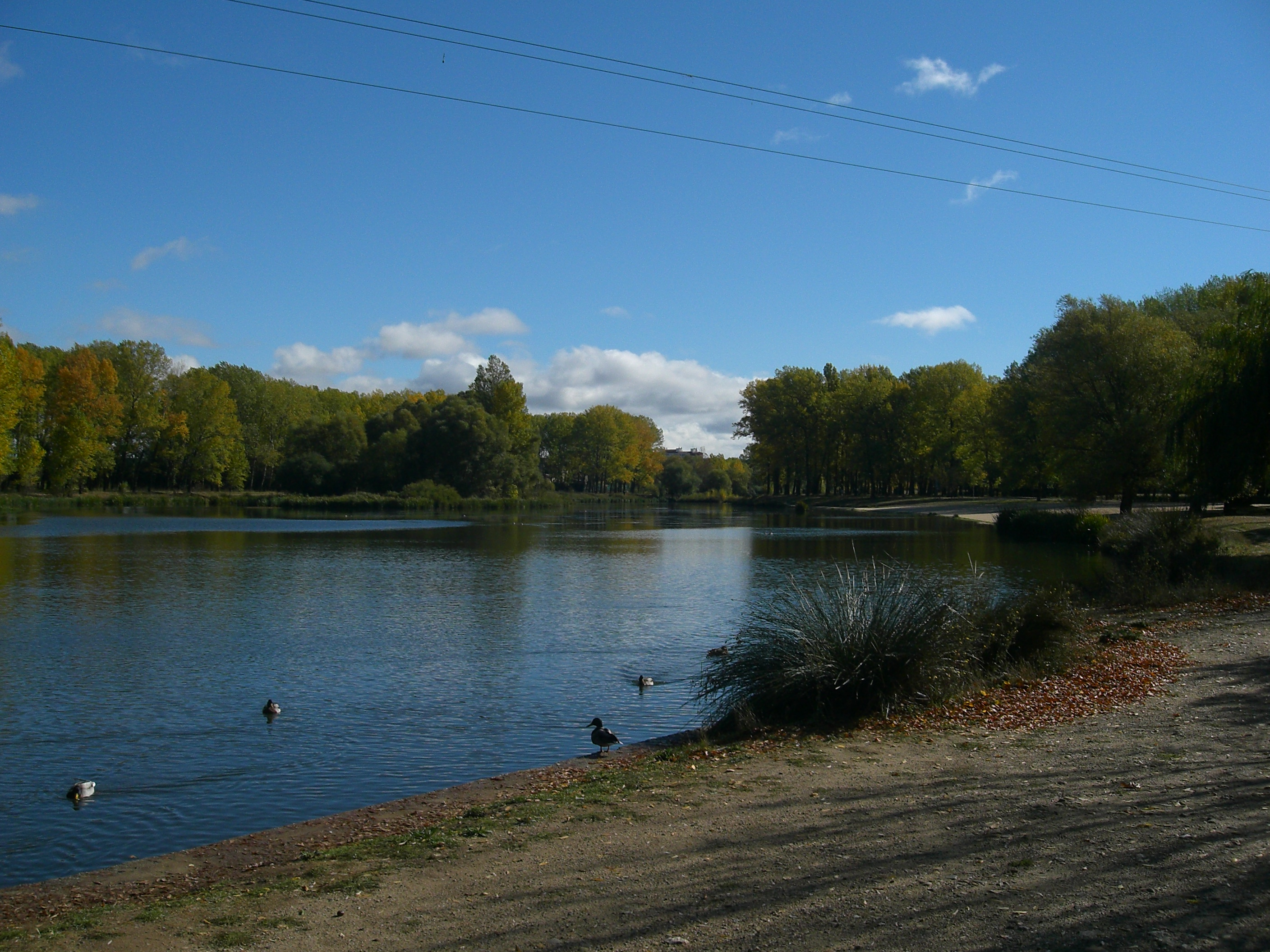 Parque de Fuentes Blancas, Burgos, España.